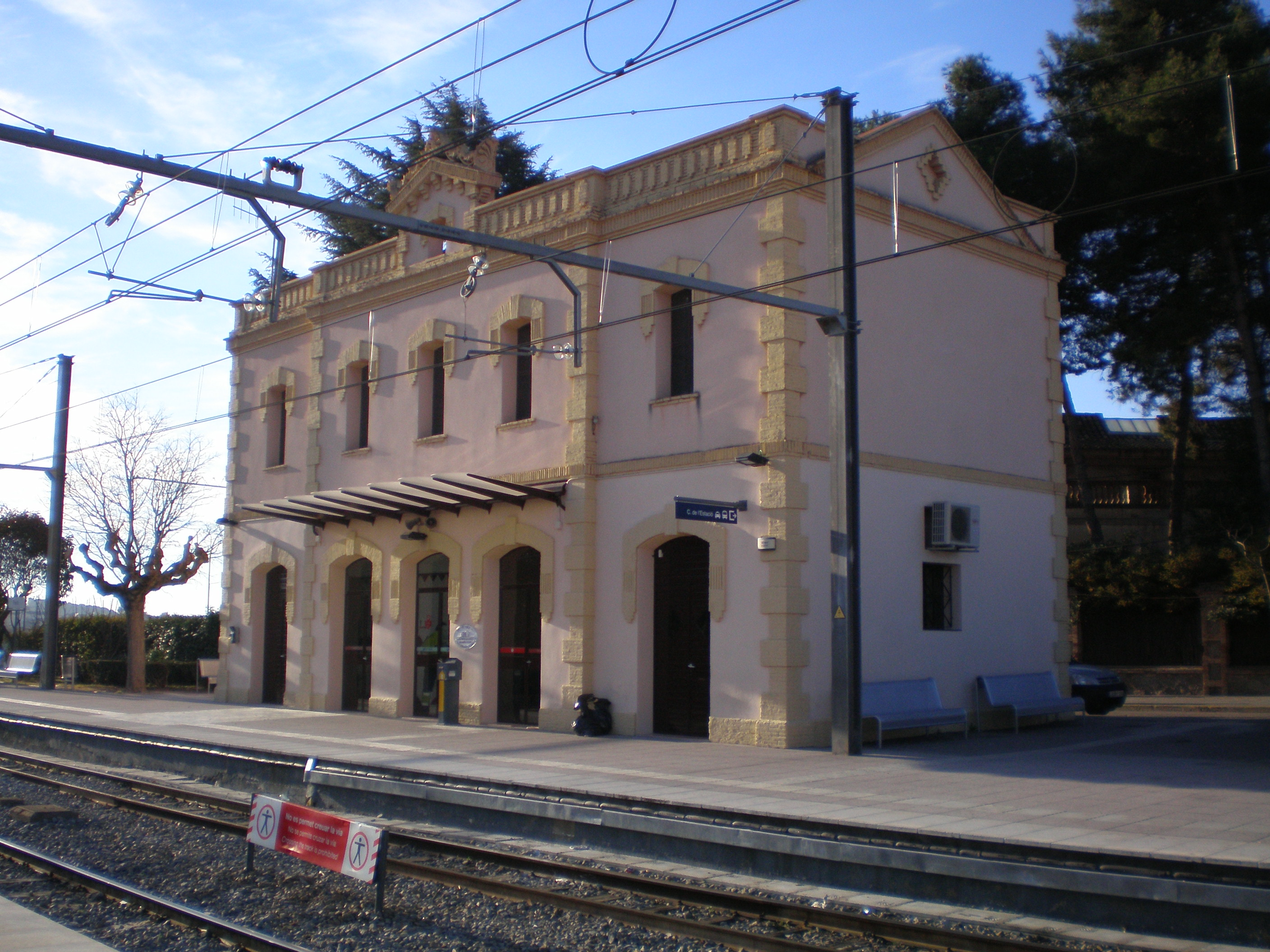 L'edifici de viatgers de Piera.